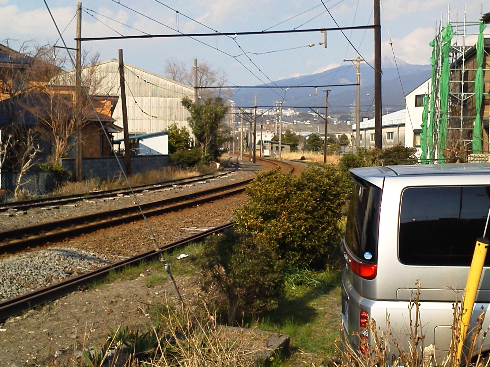 田宿信号所跡地